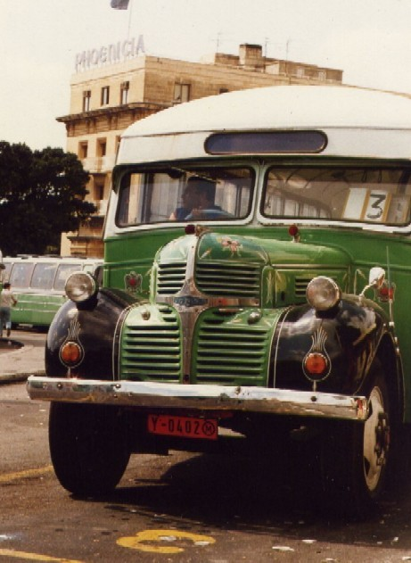 An old bus, beeing in use in Malta in the 80's Alter Bus, wie sie in den 80er Jahren auf Malta fuhren Starý autobus, jak na Maltě jezdily v osmdesátých letech